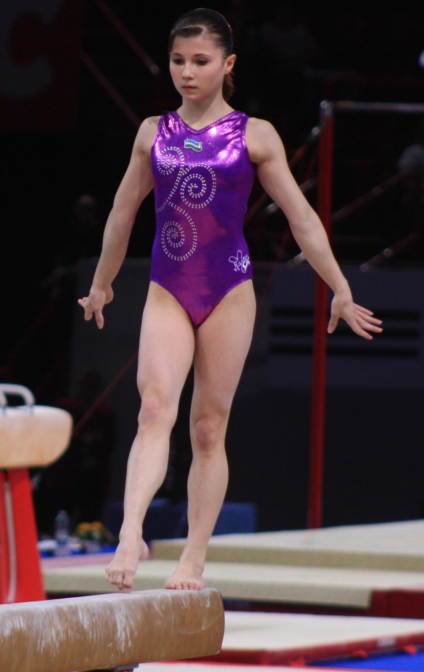 Luisa Galiulina lors des qualifications de la poutre aux 17e Internationaux de France en 2010.